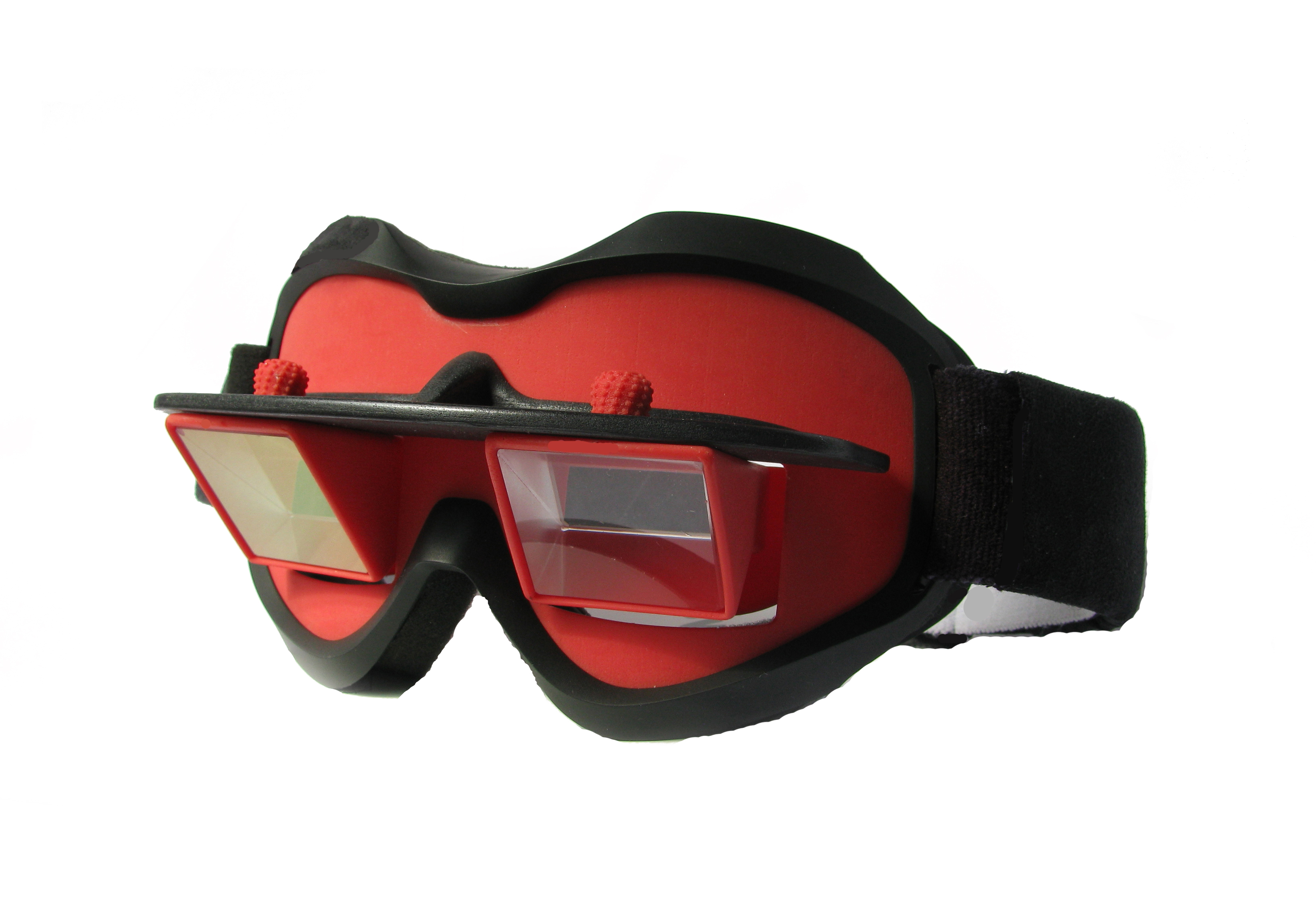 Инвертоскоп, Upside down goggles